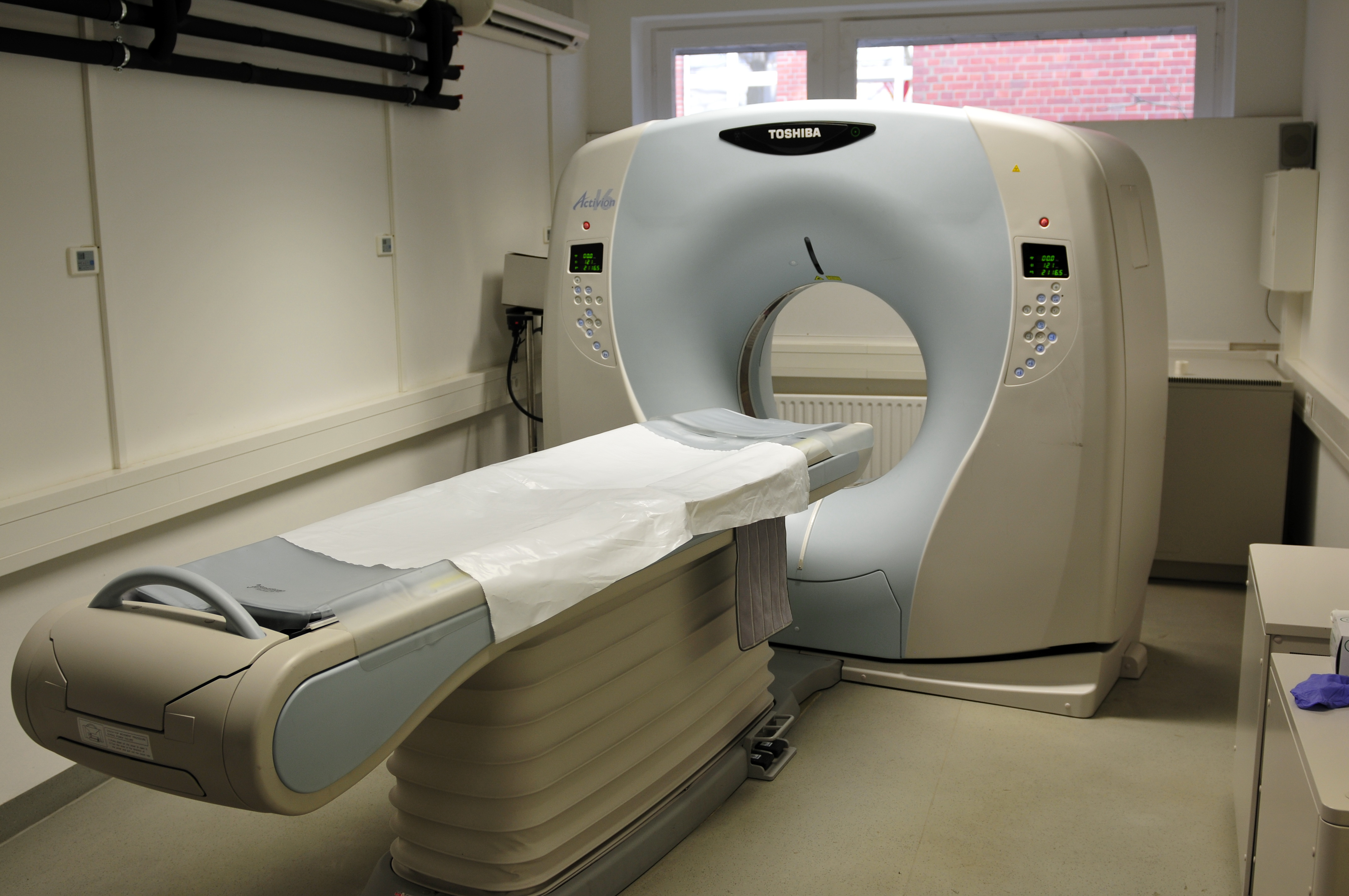 Rechtsmedizin der Charité Berlin